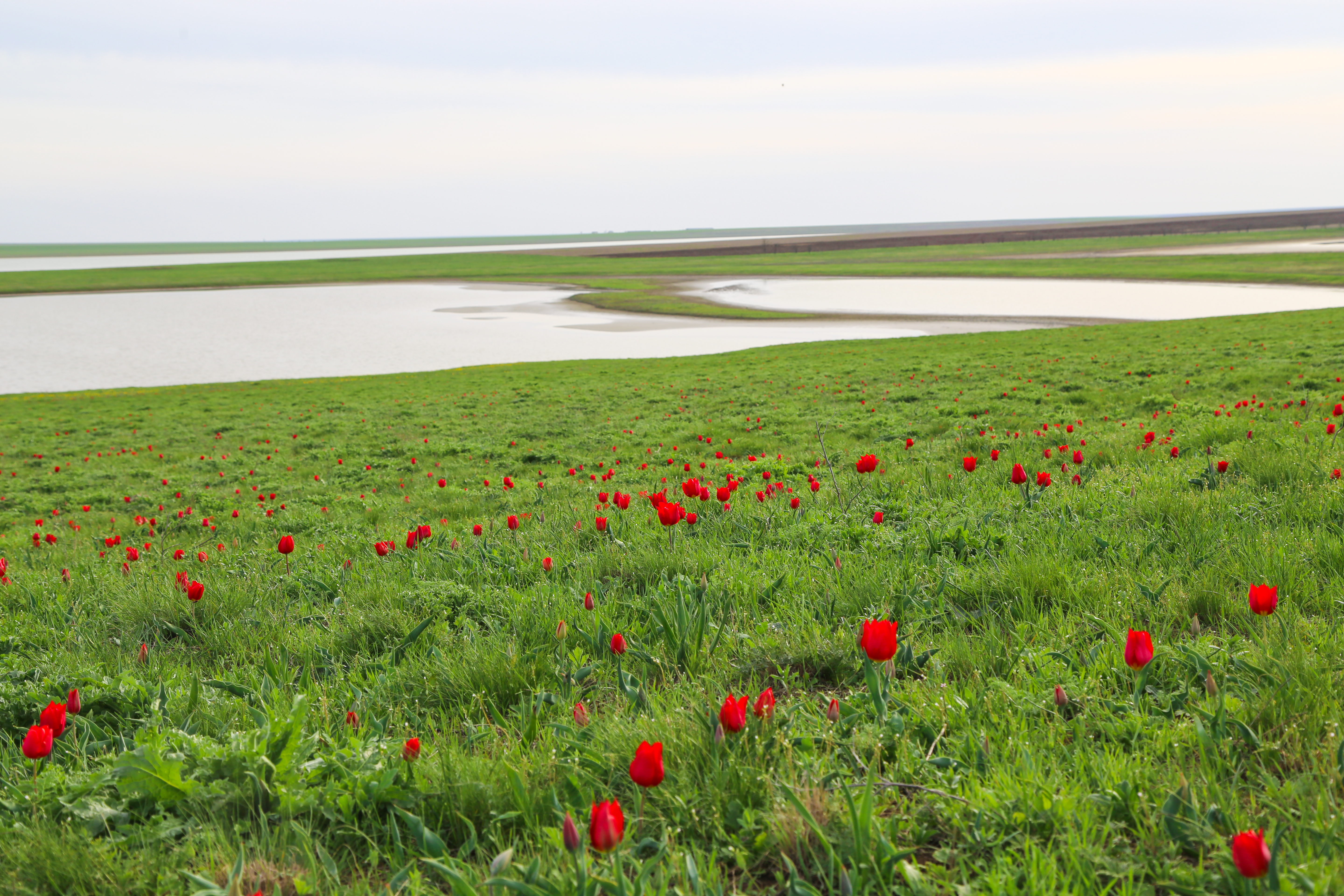 Буферная зона заповедника "Ростовский", цветение диких тюльпанов Геснера и Биберштейна